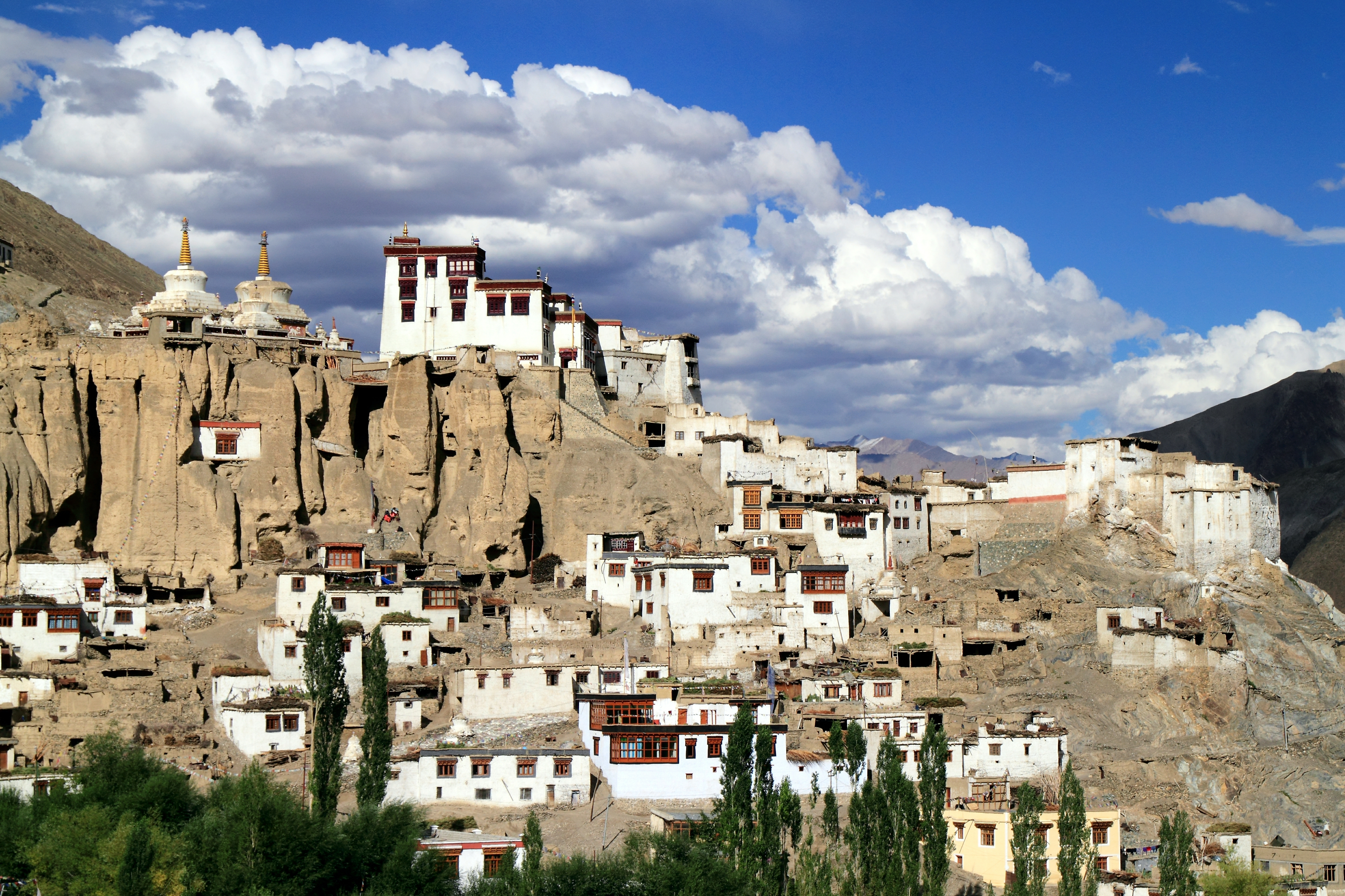 Yungdrung Gompa - Lamayuru